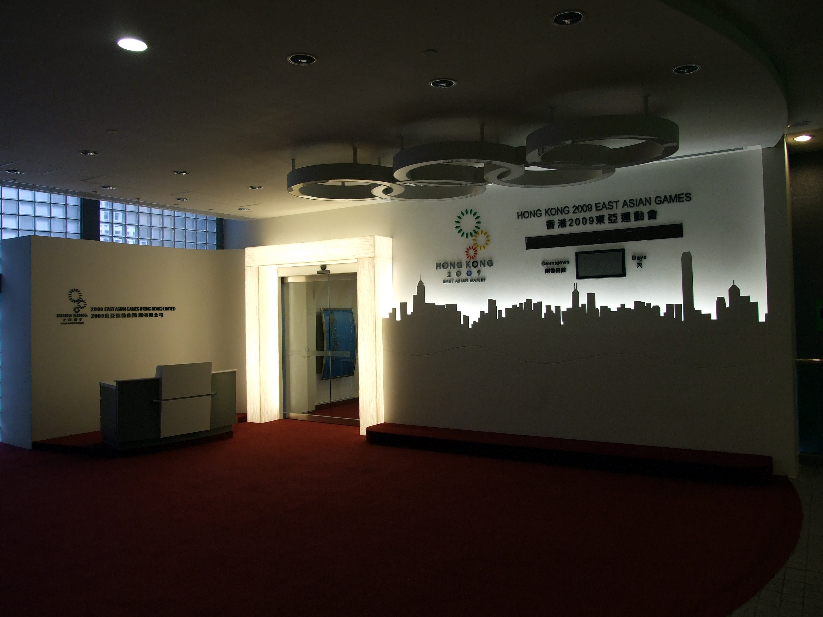 中文（香港）: 2009東亞運動會（香港）有限公司